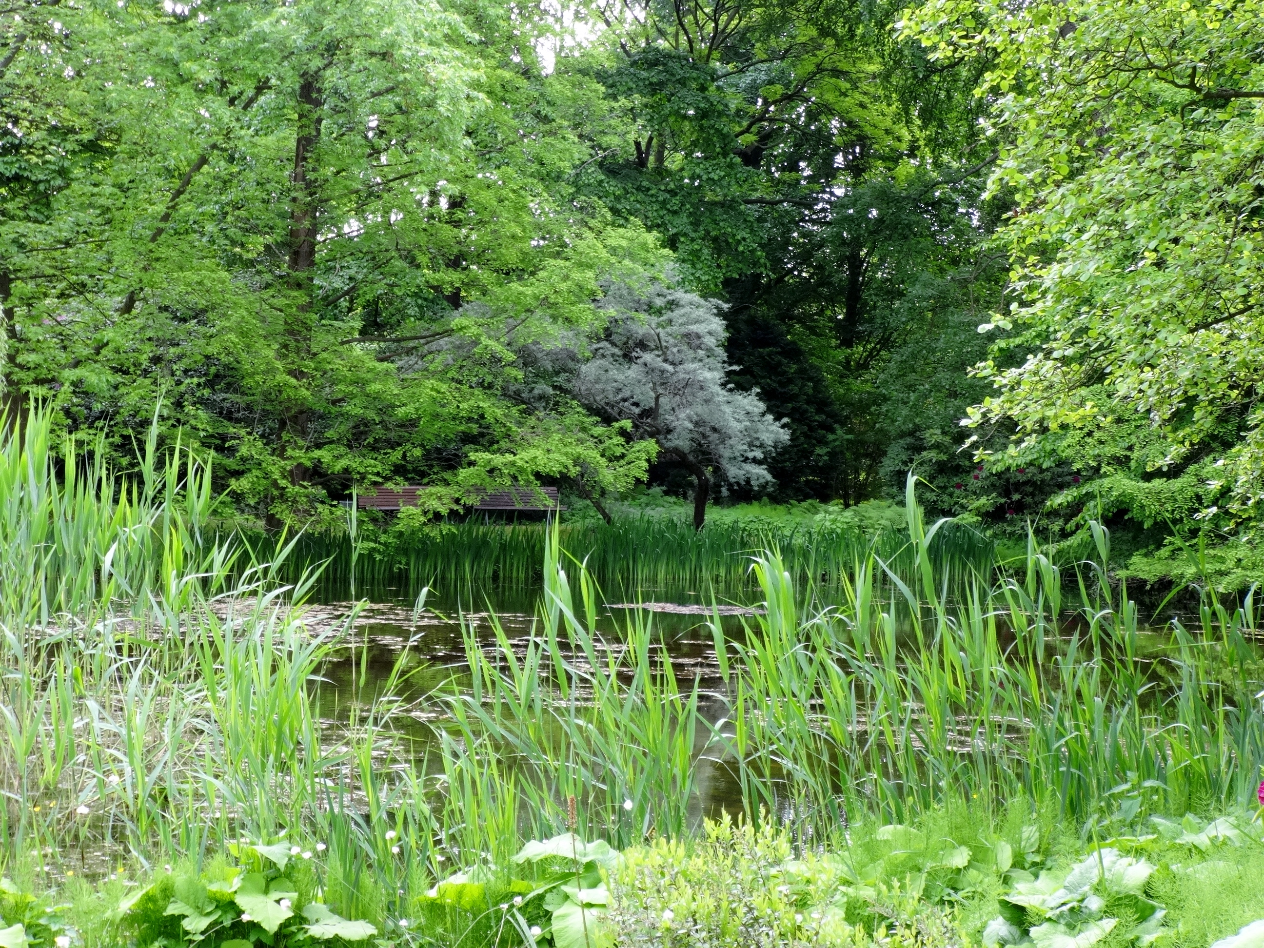 Impression aus dem Späth-Arboretum, ein 3,5 Hektar großes Arboretum in Berlin-Baumschulenweg, das zur Humboldt-Universität zu Berlin gehört.